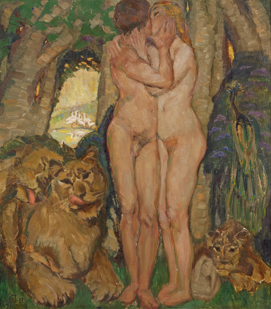 "Im Paradies". Öl auf Malkarton. Links unten Monogramm "FW" im Quadrat mit Datierung (19)17. 86 cm x75 cm